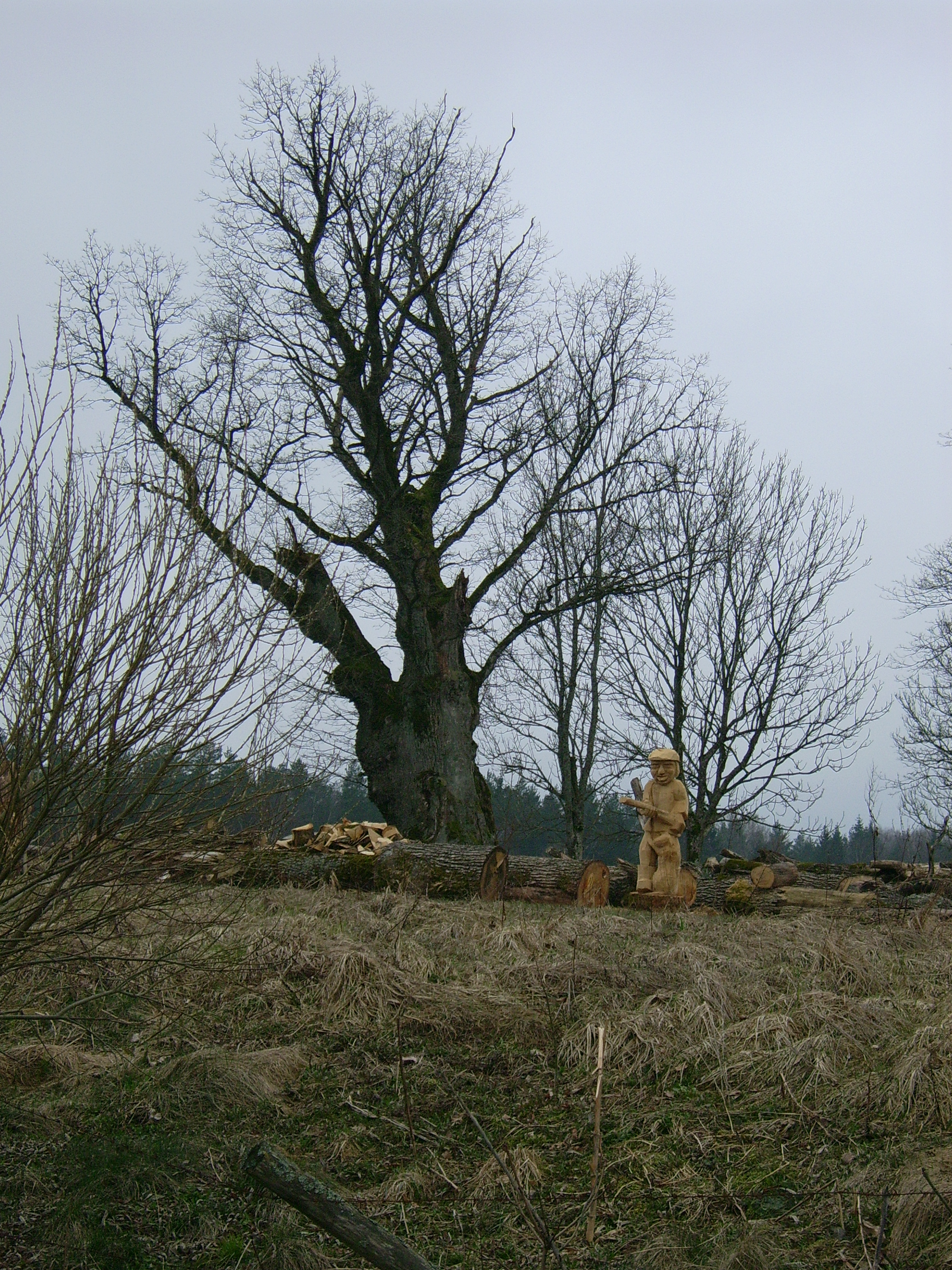 Ažuolas Gudlaukyje (Quercus robur)